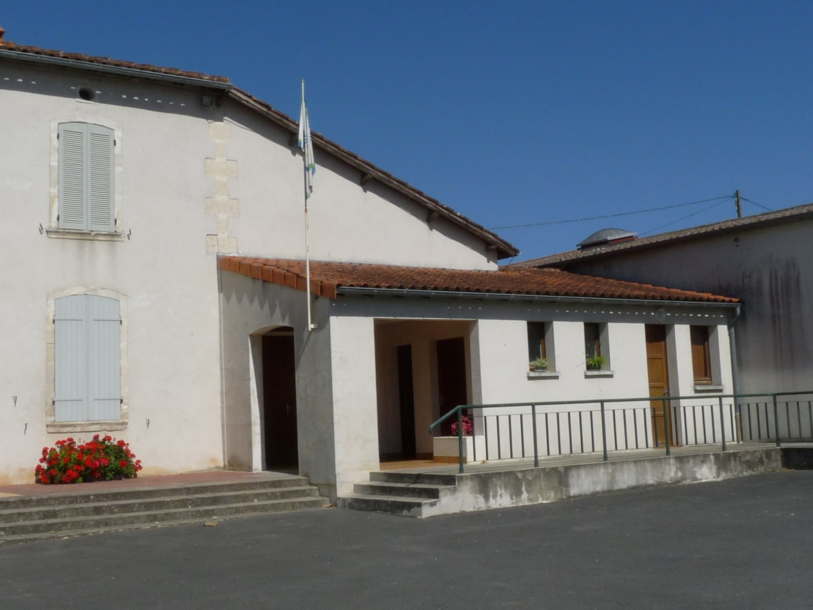 Salle des fêtes, Mortiers, Charente-Maritime, France